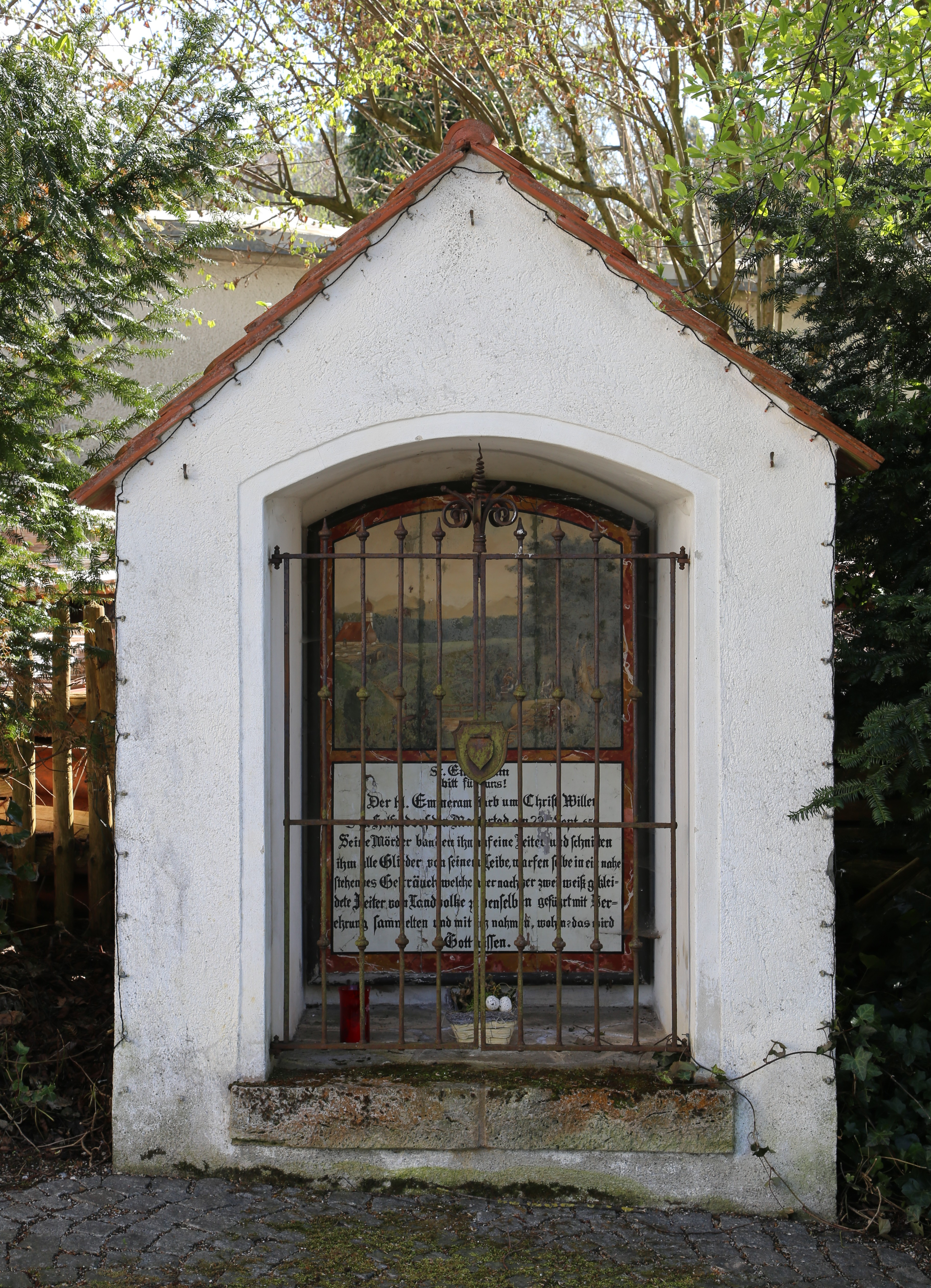 Kapellenbildstock, sogenannte Lindenkapelle. Zweite Hälfte 19. Jahrhundert. Bei der Marterkapelle.